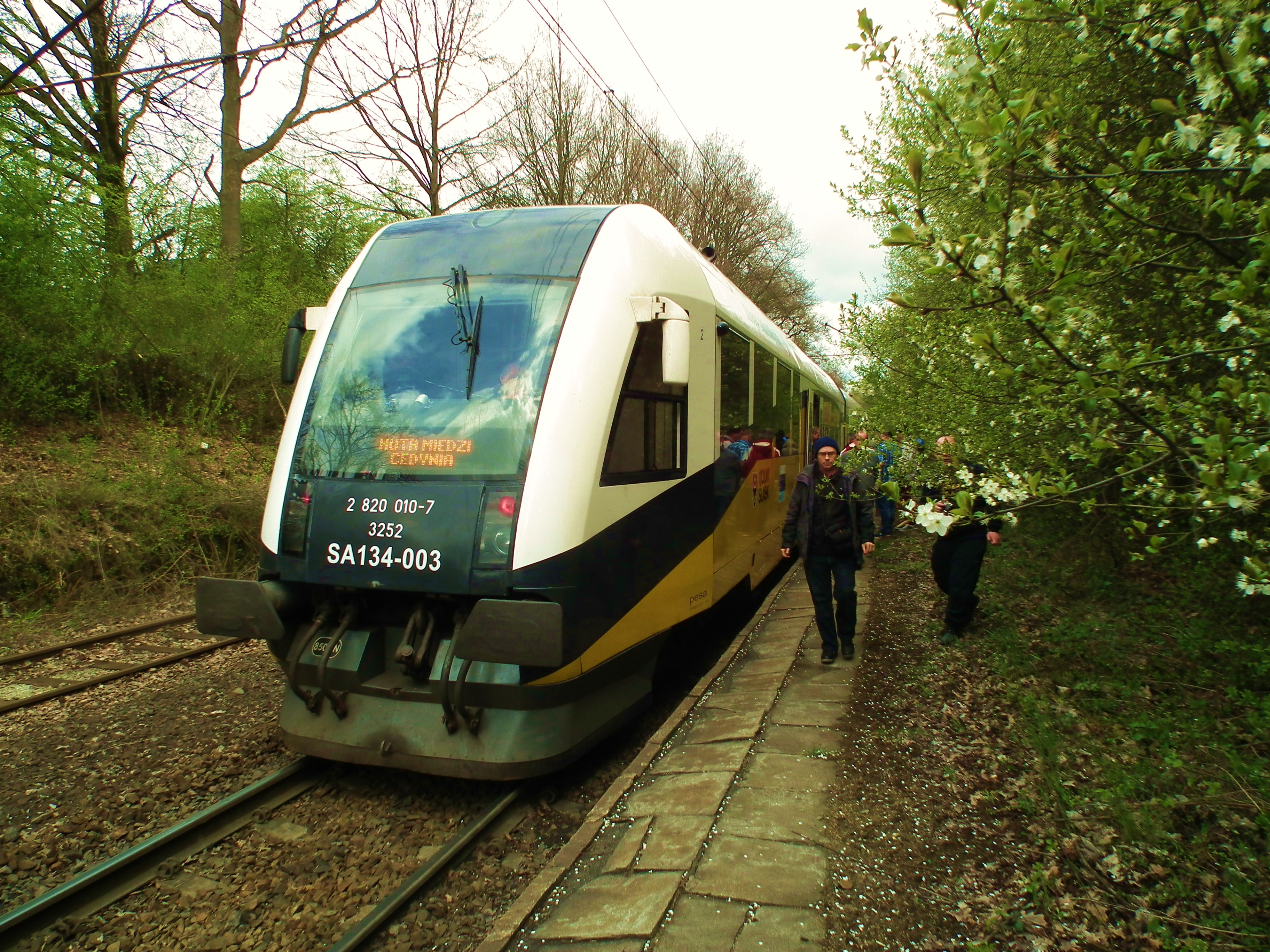 SA134-003 i SA134-024 jako pociąg specjalny Kolei Dolnośląskich pod nazwą Dolnośląskie Zakamarki IV w dniu 22.4.2017r. Przystanek Koźlice.